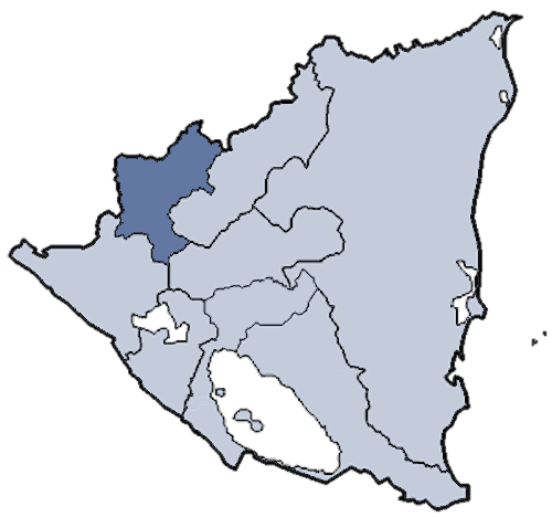 Mappa della diocesi cattolica di Esteli, in Nicaragua. Lavoro personale eseguito a partire da questa immagine di Commons. Fonte per i confini delle diocesi: Categoria:Chiesa cattolica in Nicaragua